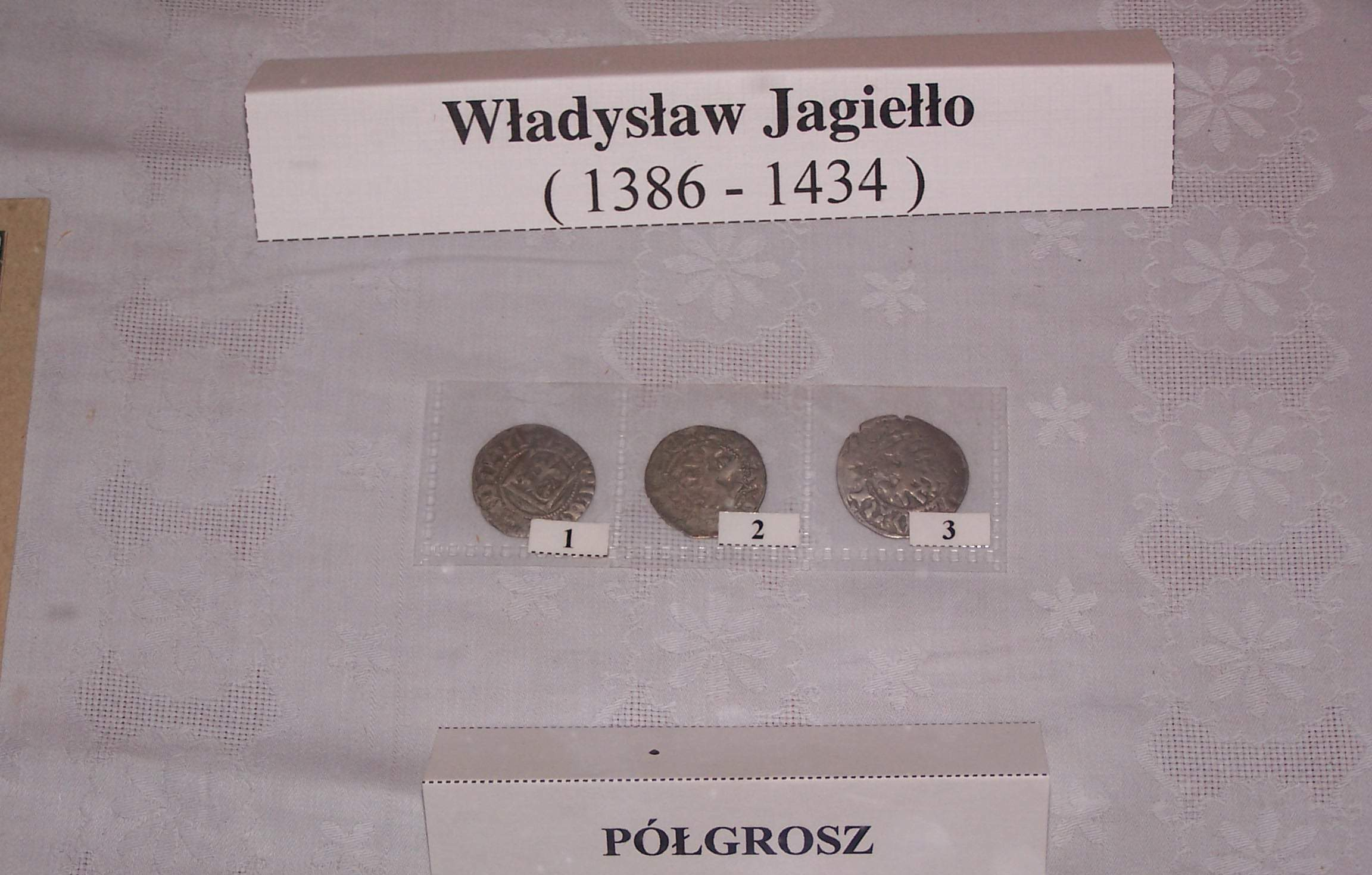 Photo by Piotrus. Półgrosz coin in Cistercians monastery in Szczyrzyc, Poland. 17th century. From the reign of . Półgrosz Opactwo cystersów w Szczyrzycu